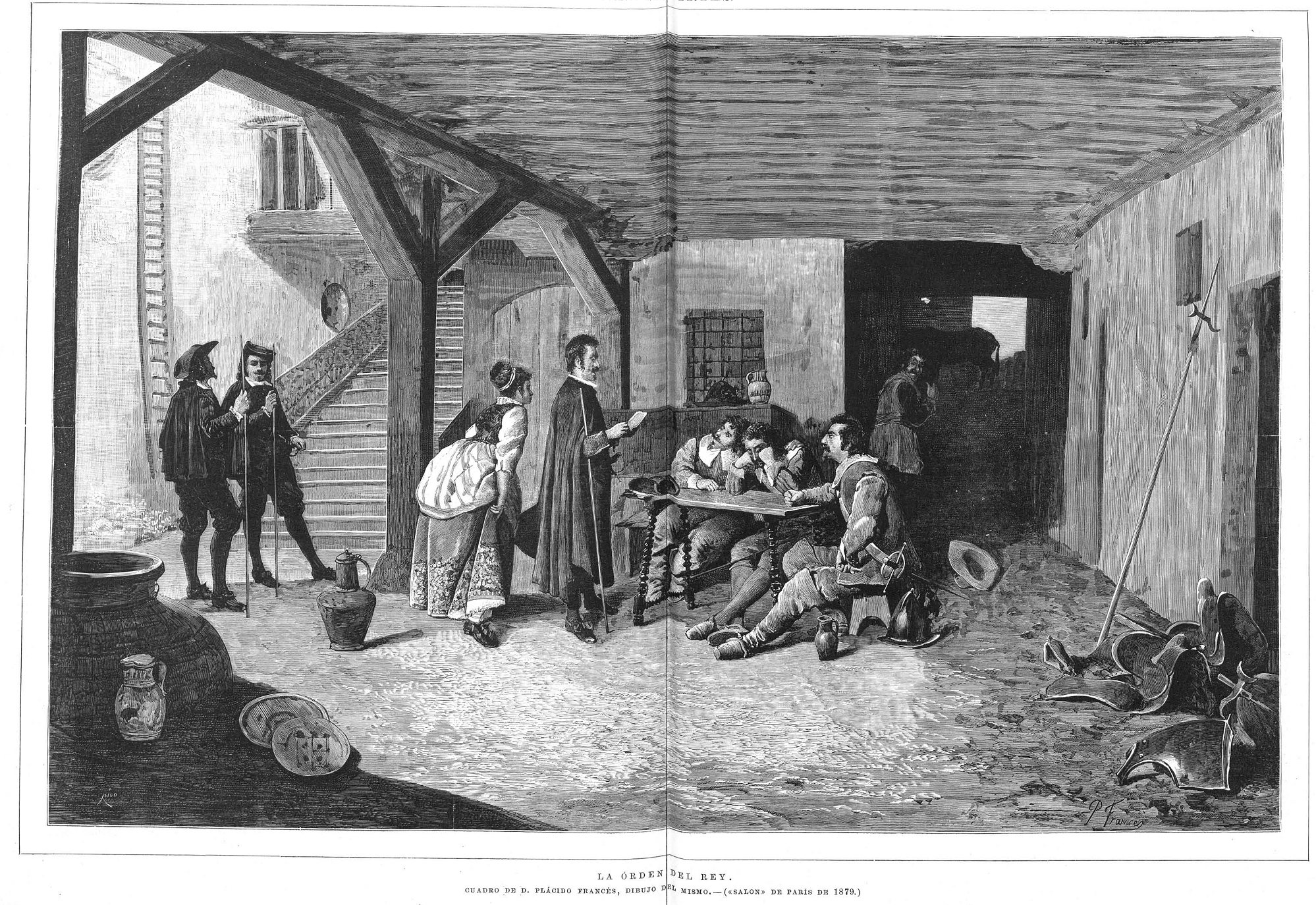 La orden del rey, cuadro de Plácido Francés y Pascual, publicado en la revista española La Ilustración Española y Americana.